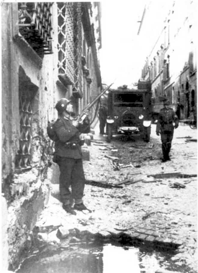 Soldato tedesco in via Rasella dopo l'attentato del 23 marzo 1944